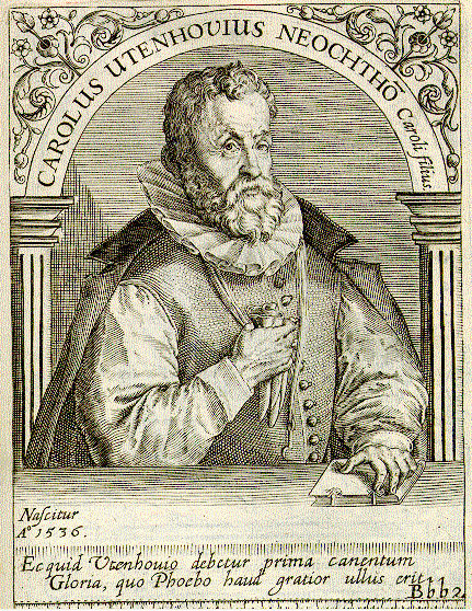 Karl von Utenhove, Kupferstich von Theodor de Bry um 1598 nach einem zeitgenössischen Portrait von Crispijn van de Pas